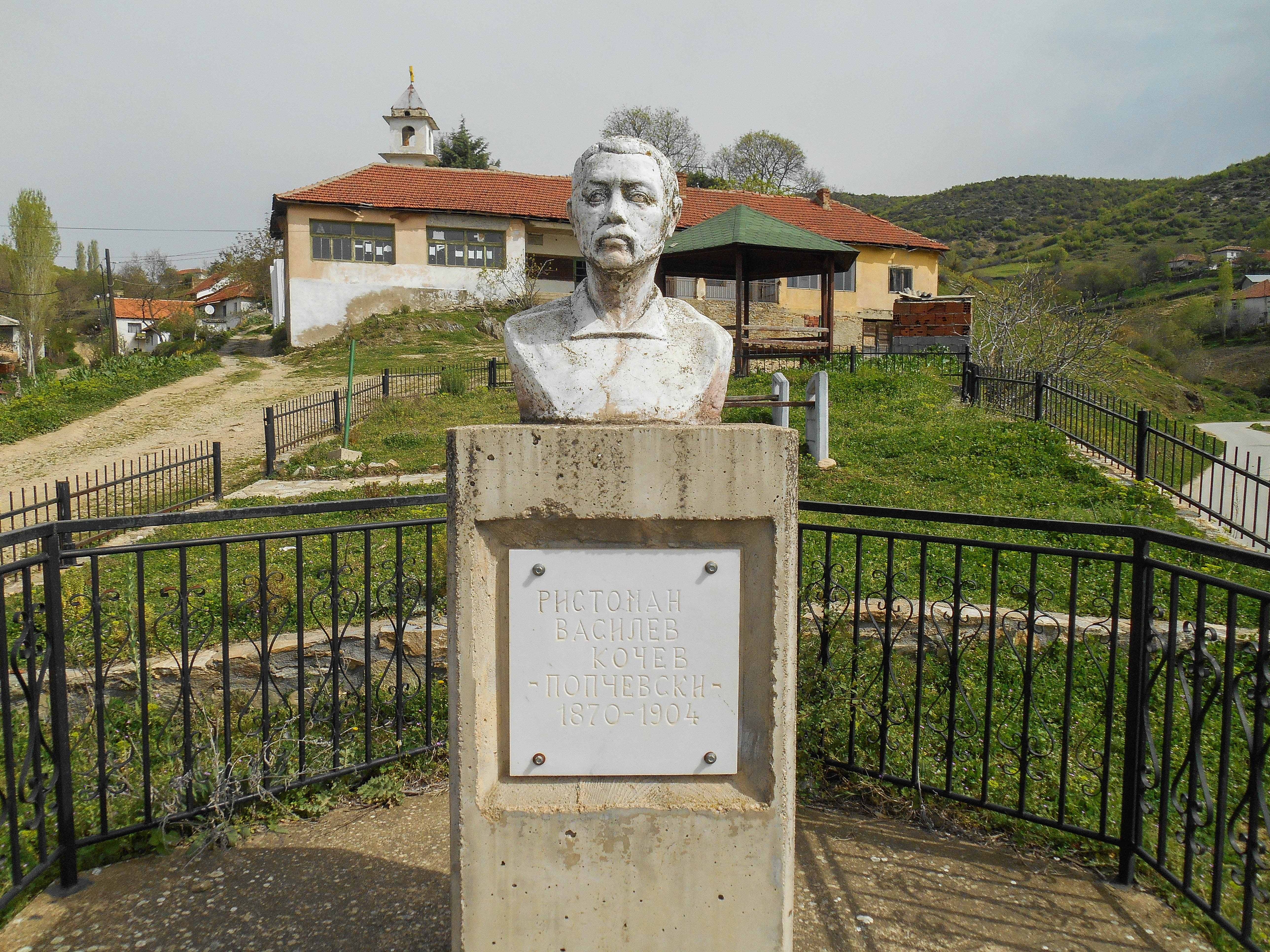 Споменик на Ристоман Попчевски